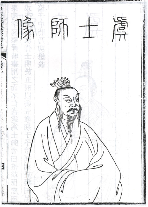 皋陶，传说中远古时人，舜命作掌刑法之官。